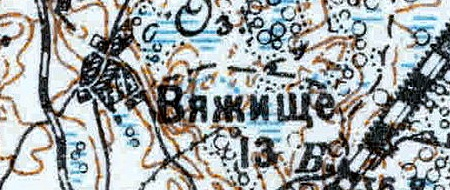 Топографическая карта Ленинградской области, квадрат VIc-28 (Луга), деревня Вяжище